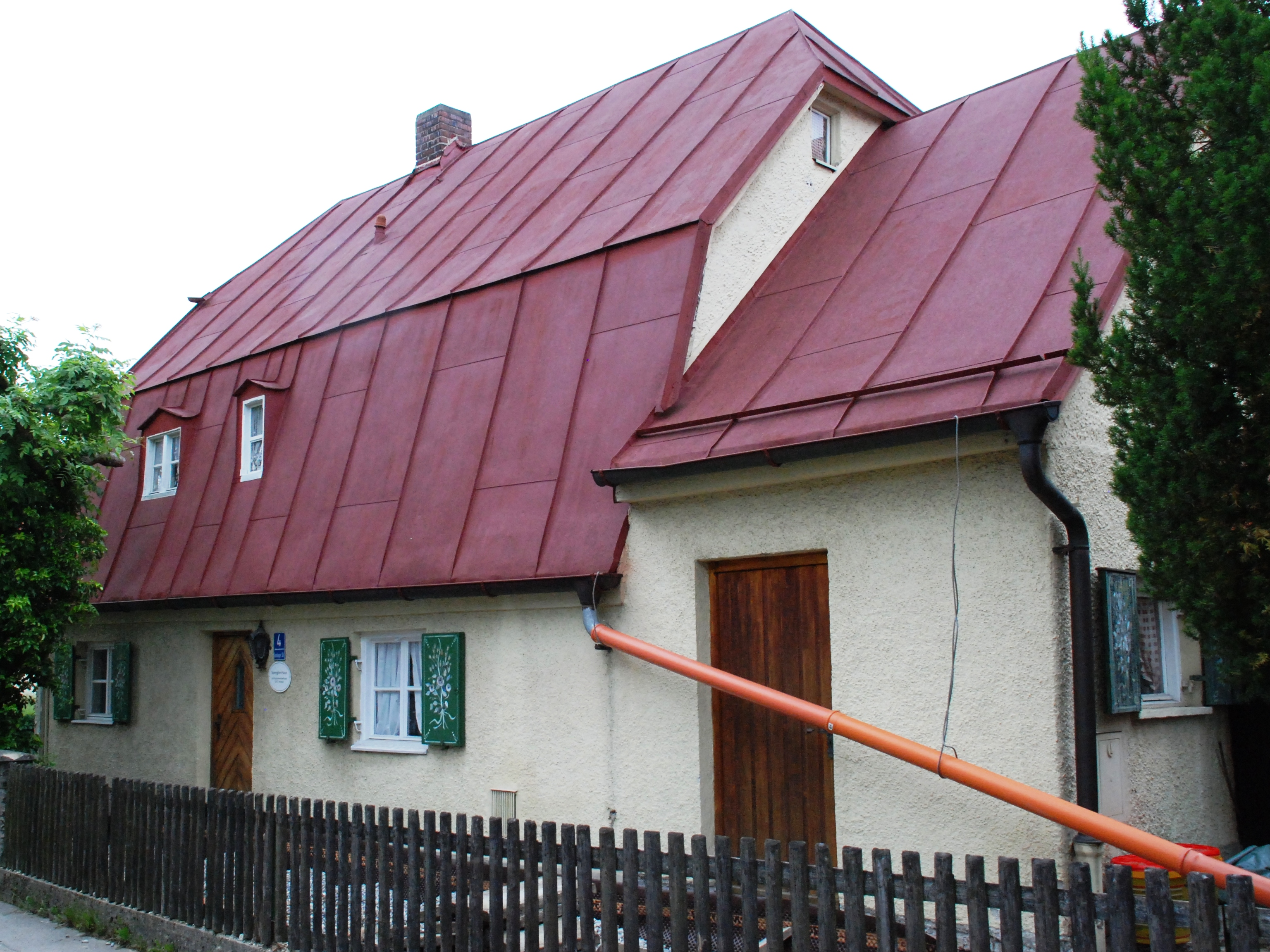 Ehemaliges Handwerkerhaus, Hausname „Beim Spengler“, in der Gautinger Straße 4 in der Gemeinde Neuried, Landkreis München, Bezirk Oberbayern, Bayern. Erbaut um 1817. Als Baudenkmal unter Aktennummer D-1-84-132-1 in der Bayerischen Denkmalliste aufgeführt. Foto gemäß den Voraussetzungen zur Panoramafreiheit von öffentlicher Verkehrsfläche aus aufgenommen.